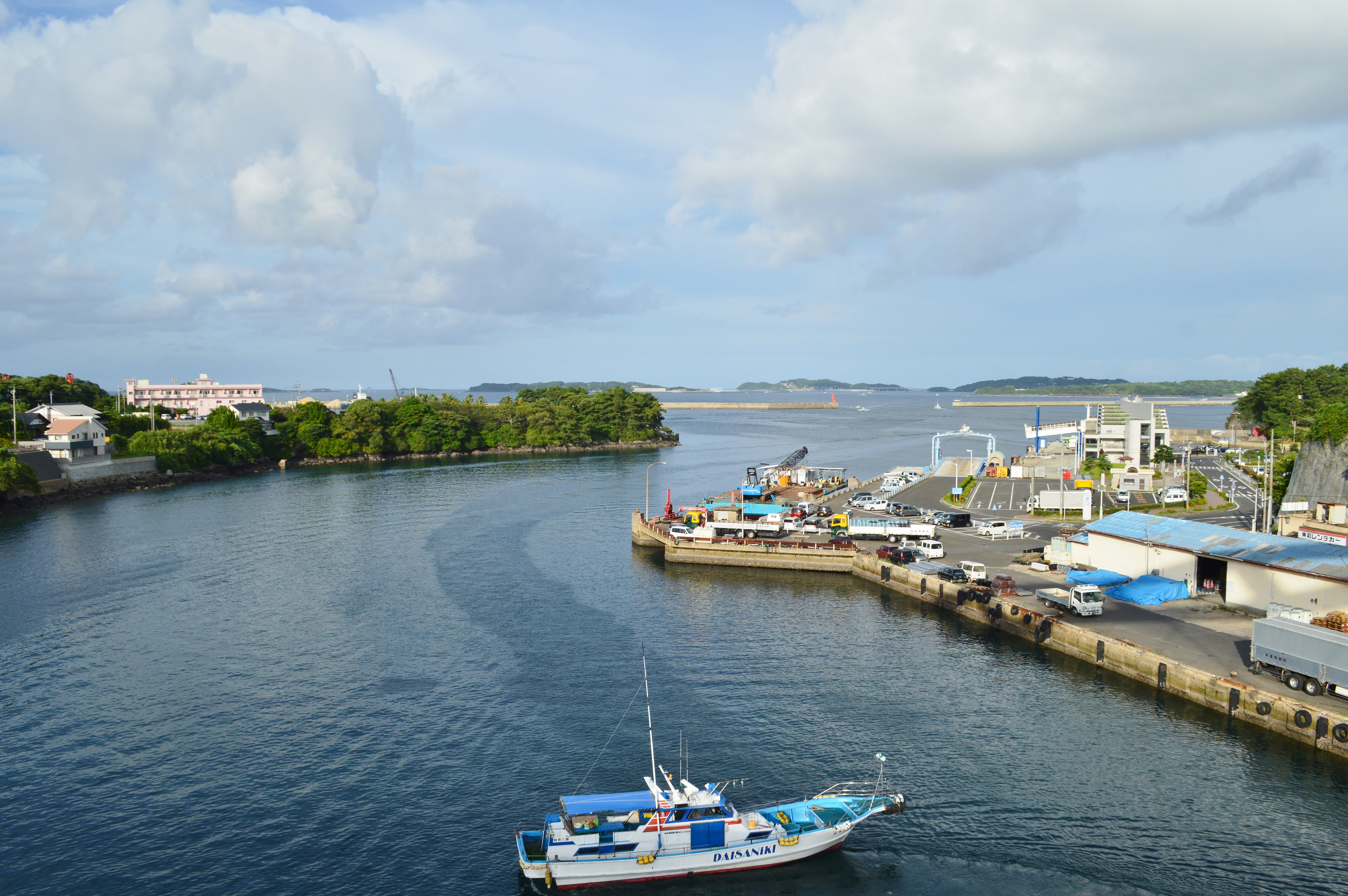 壱岐島 郷ノ浦湾